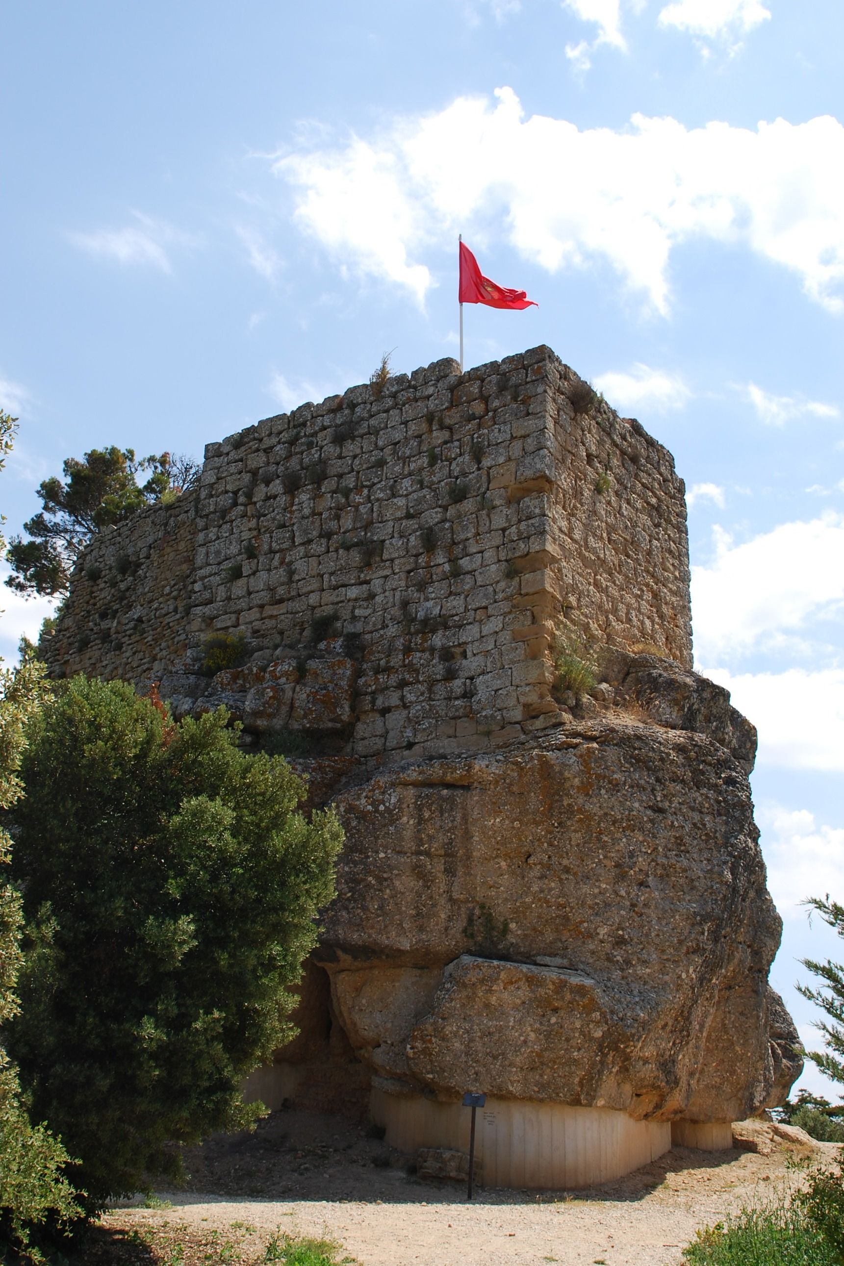 Castillo de Monjardín en Villamayor de Monjardín (Navarra, España)